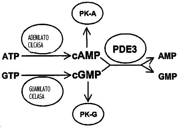 Figura 1: Papel de PDE3 en la transducción de las señales mediadas por cAMP y cGMP. Role of PDE3 in cAMP and cGMP mediated signal transduction. PK-A: Protein Quinasa A (cAMP dependiente). PK-G: Protein quinasa G (cGMP dependiente).